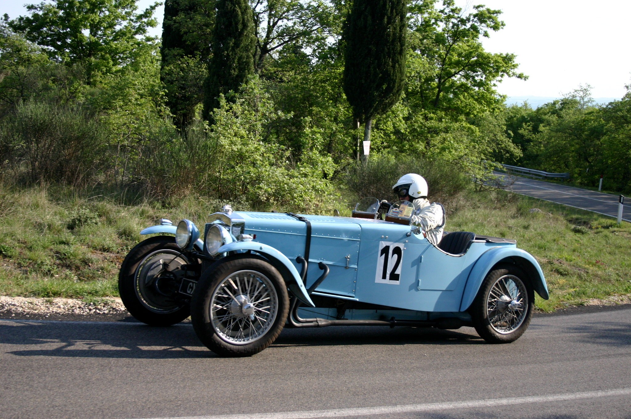 Una Frazer Nash TT Replica durante la Cronoscalata della Castellana a Orvieto. La vettura è condotta dallo specialista Georg Prugger